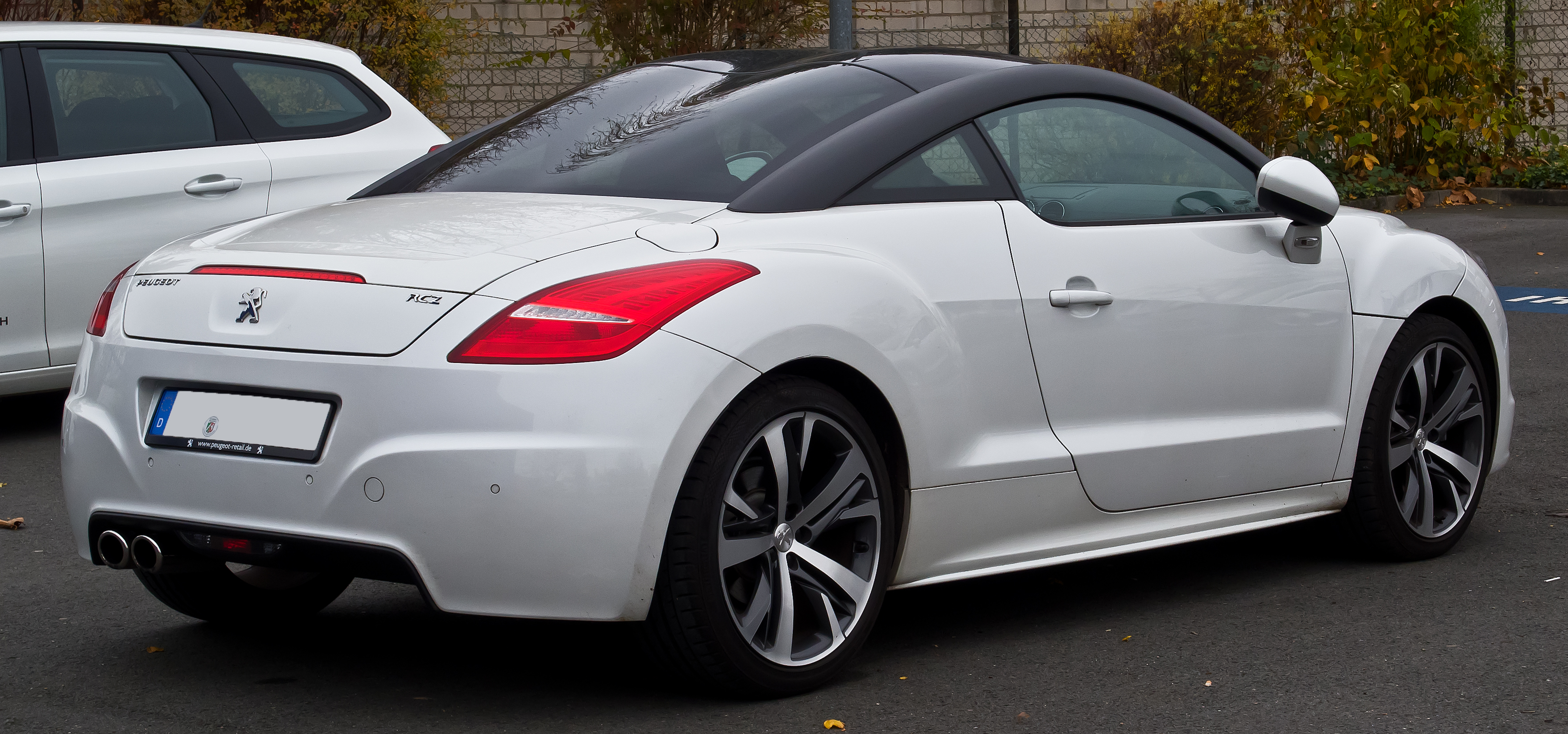 Peugeot RCZ (Facelift)